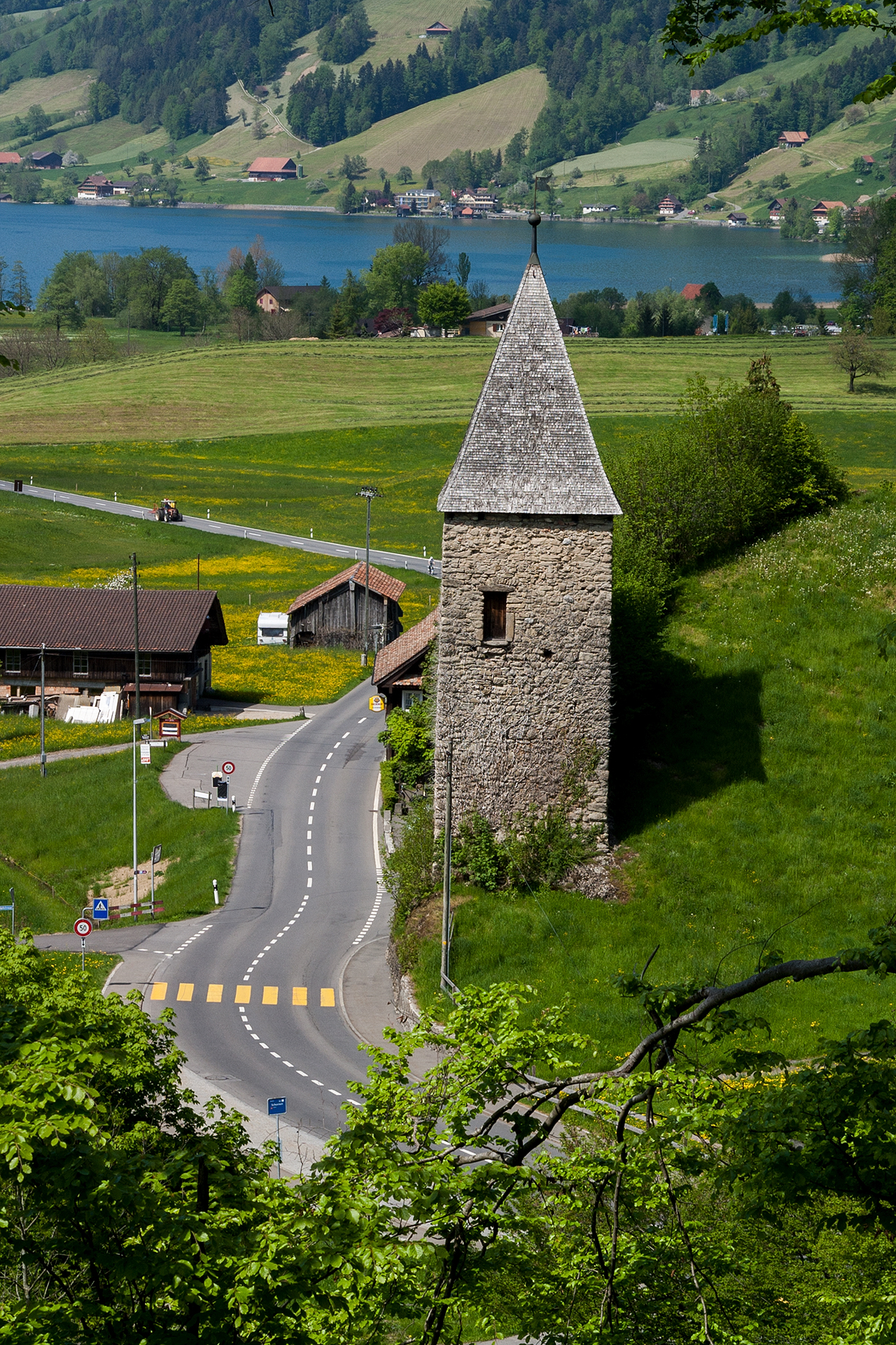 Letziturm in Morgarten